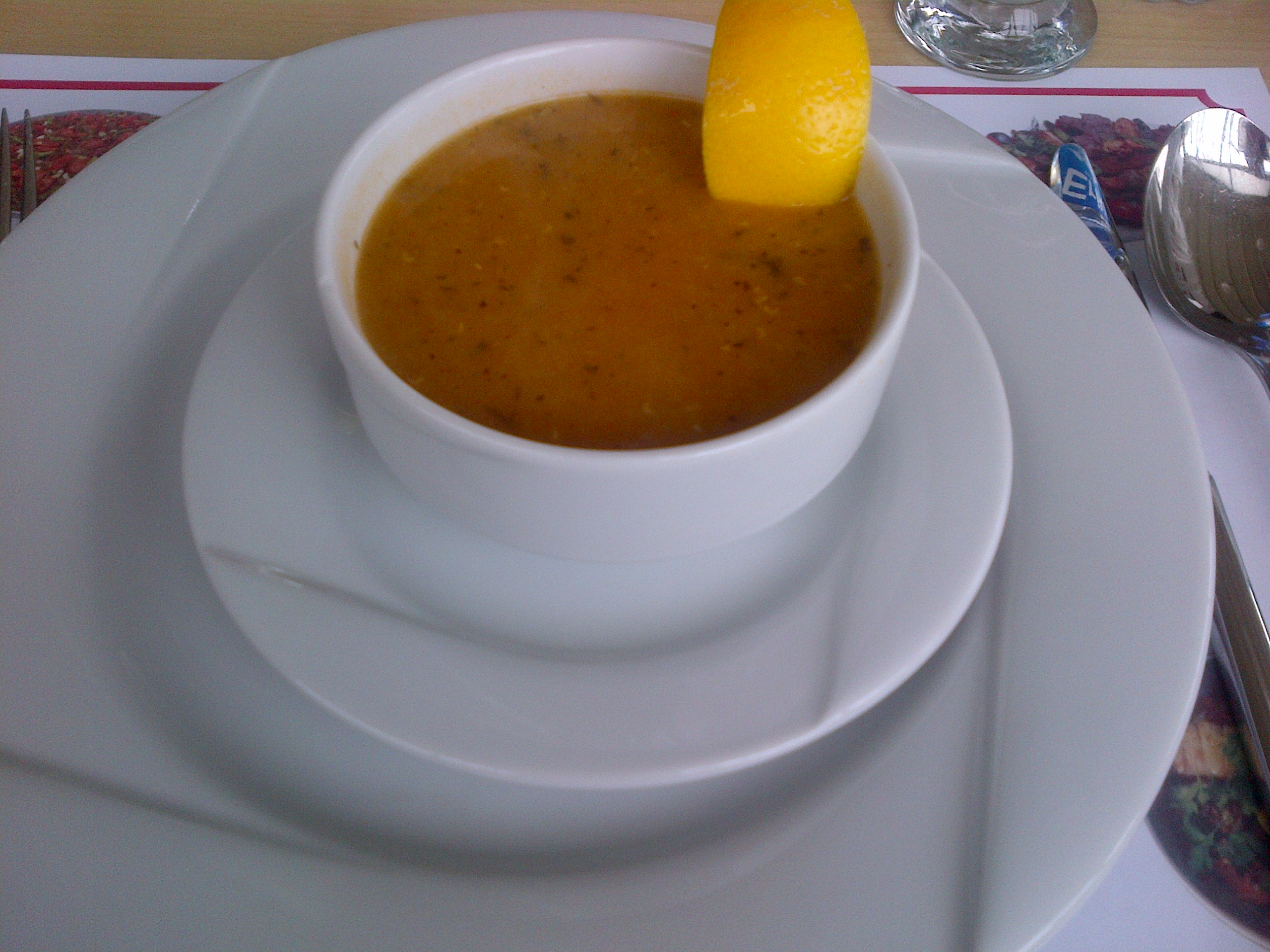 Ezogelin, una sopa a base de lentejas rojas, de la cocina turca.